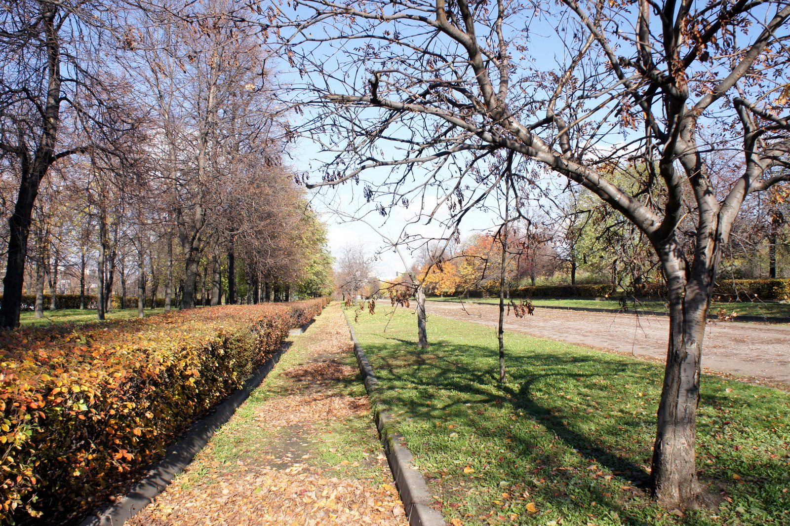 Парк «Нагатинская пойма».